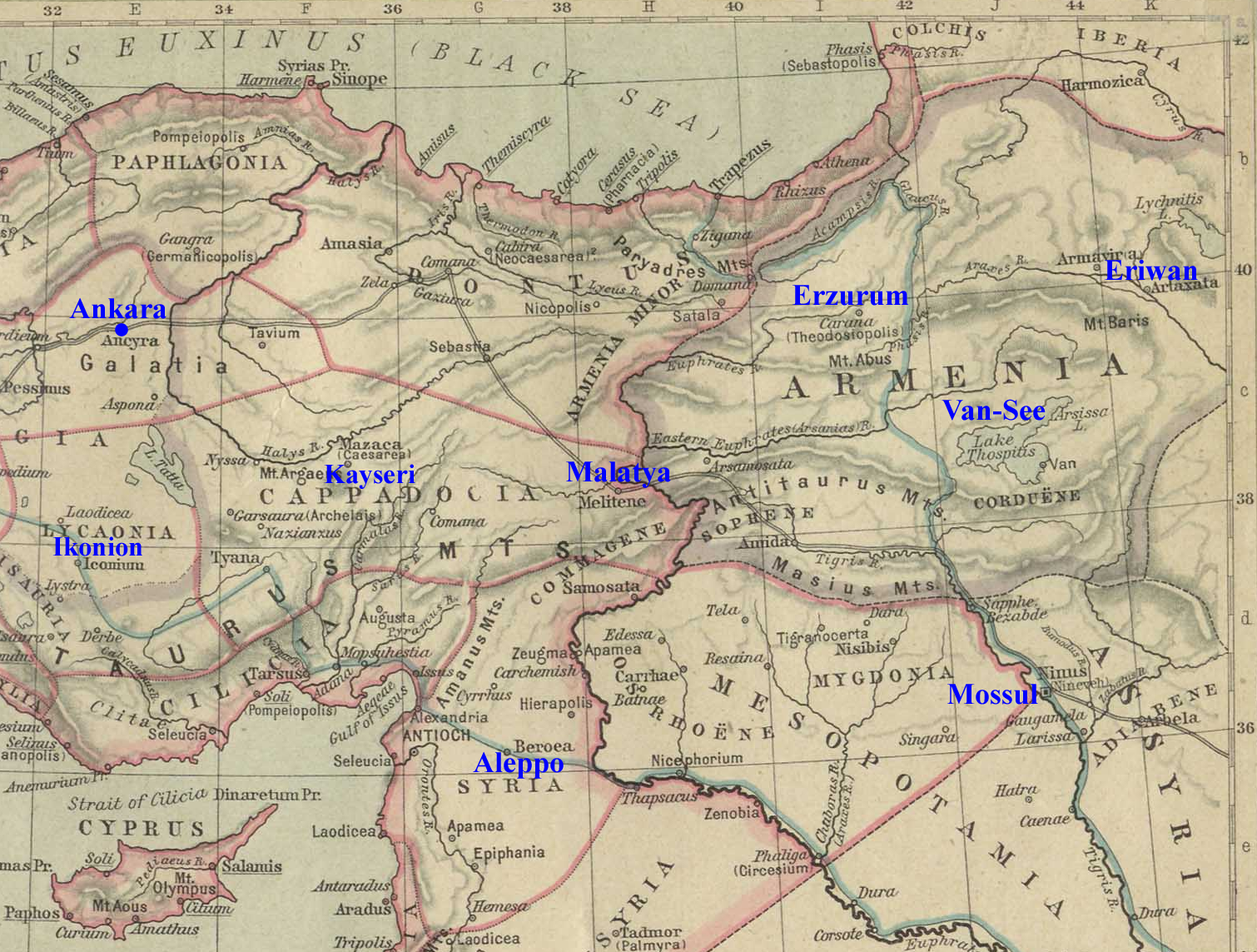 Kleinasien Ost und Armenistan